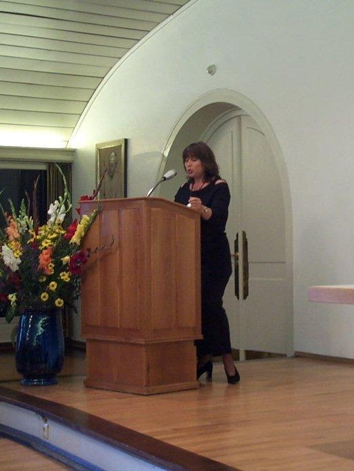 Gabriele Böhning bei den Lyriktagen Freudenstadt (2000)